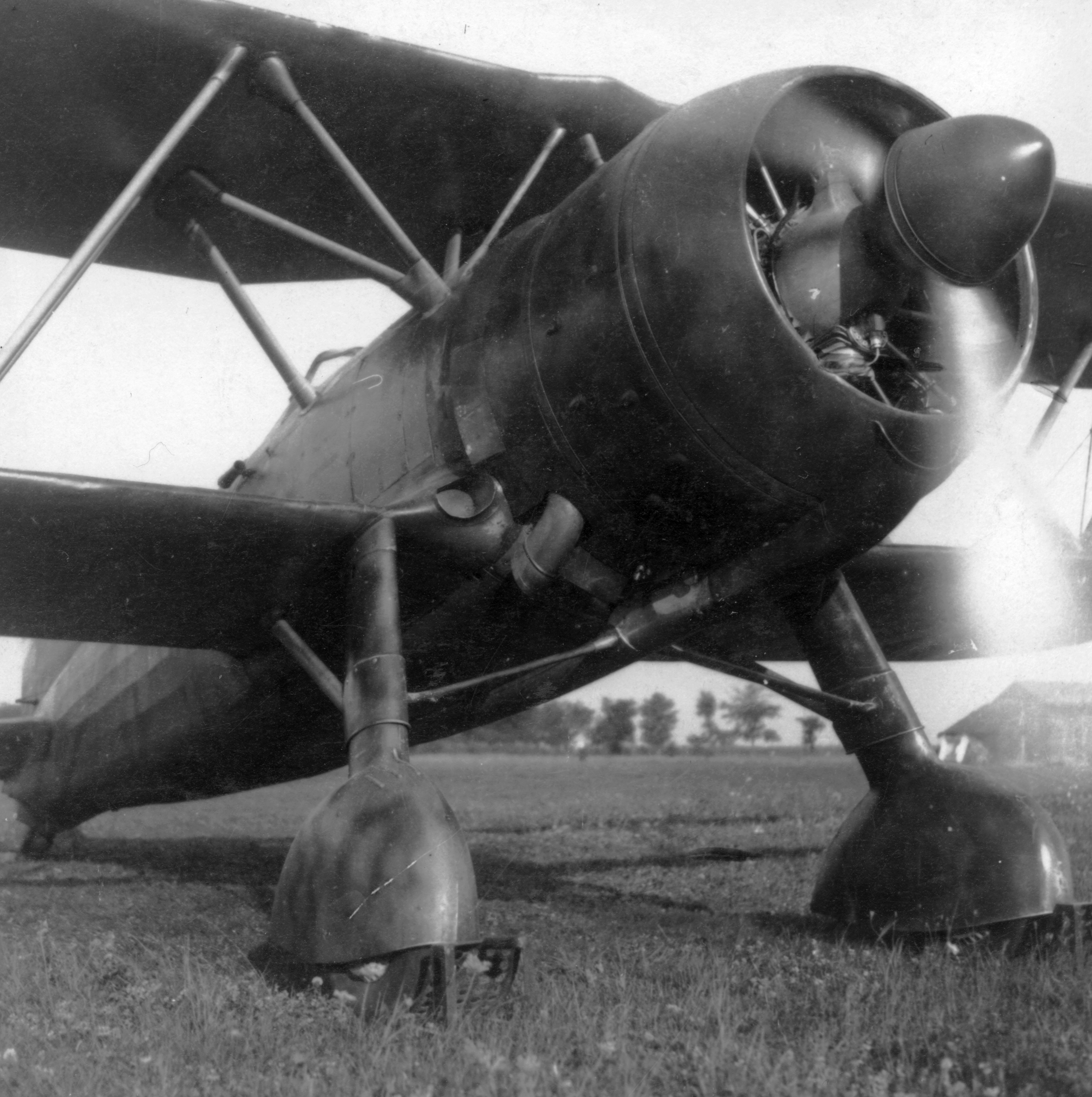 A Magyar Királyi Honvéd Légierő Fiat Cr-42 típusú vadászgépe. Tags: Royal Hungarian Air Force, airplane, Fiat-brand, Italian brand, military Title: A Magyar Királyi Honvéd Légierő Fiat Cr-42 típusú vadászgépe.